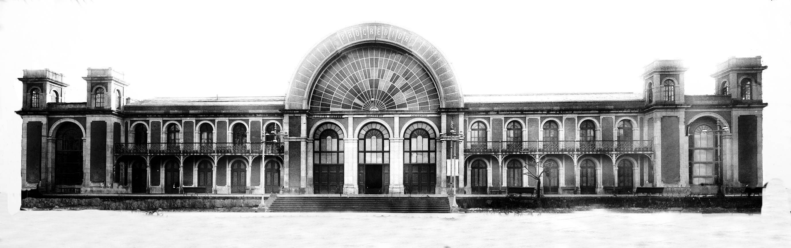 Old Cristal Palace in Oporto Portugal